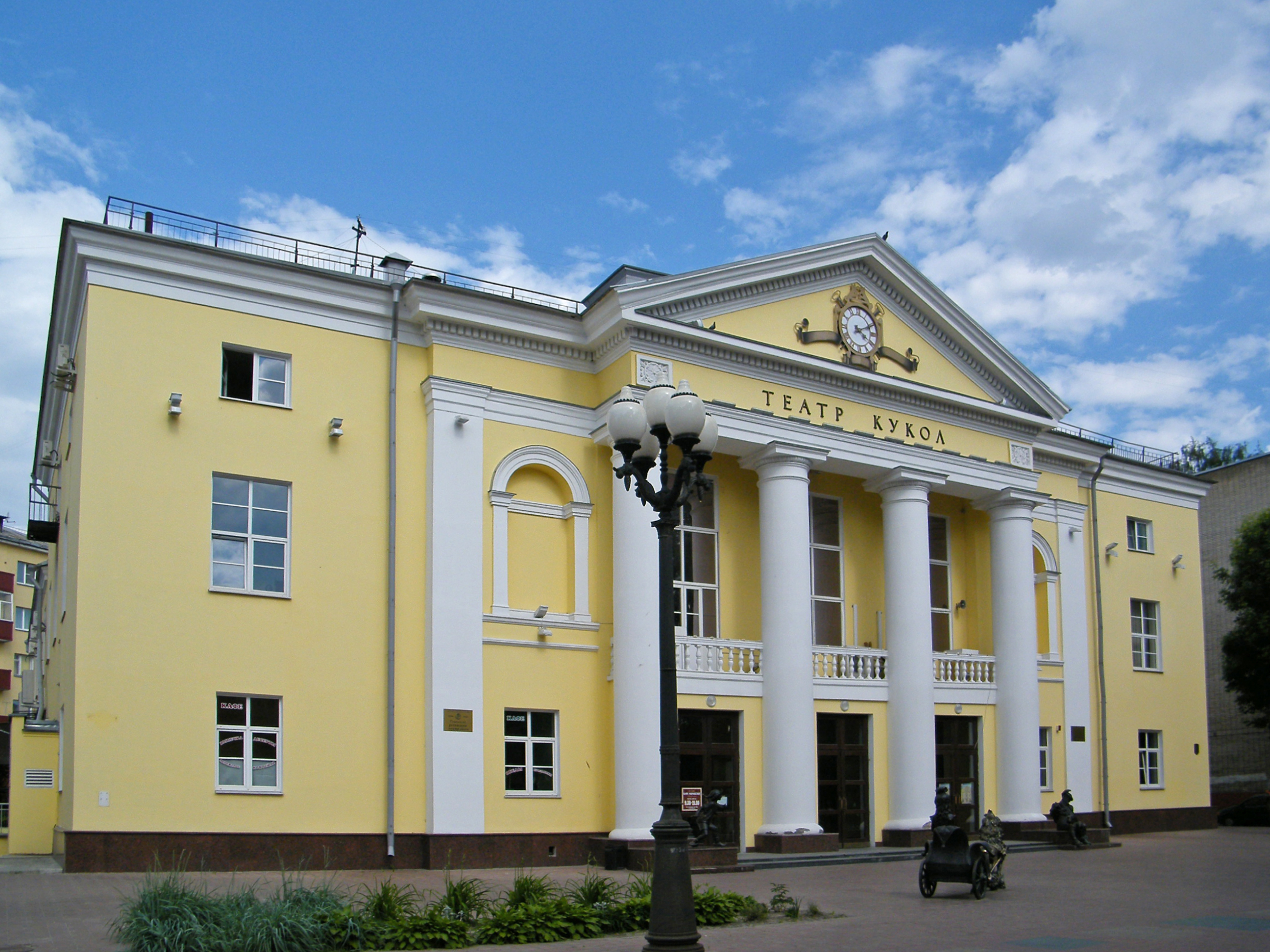 Театр кукол